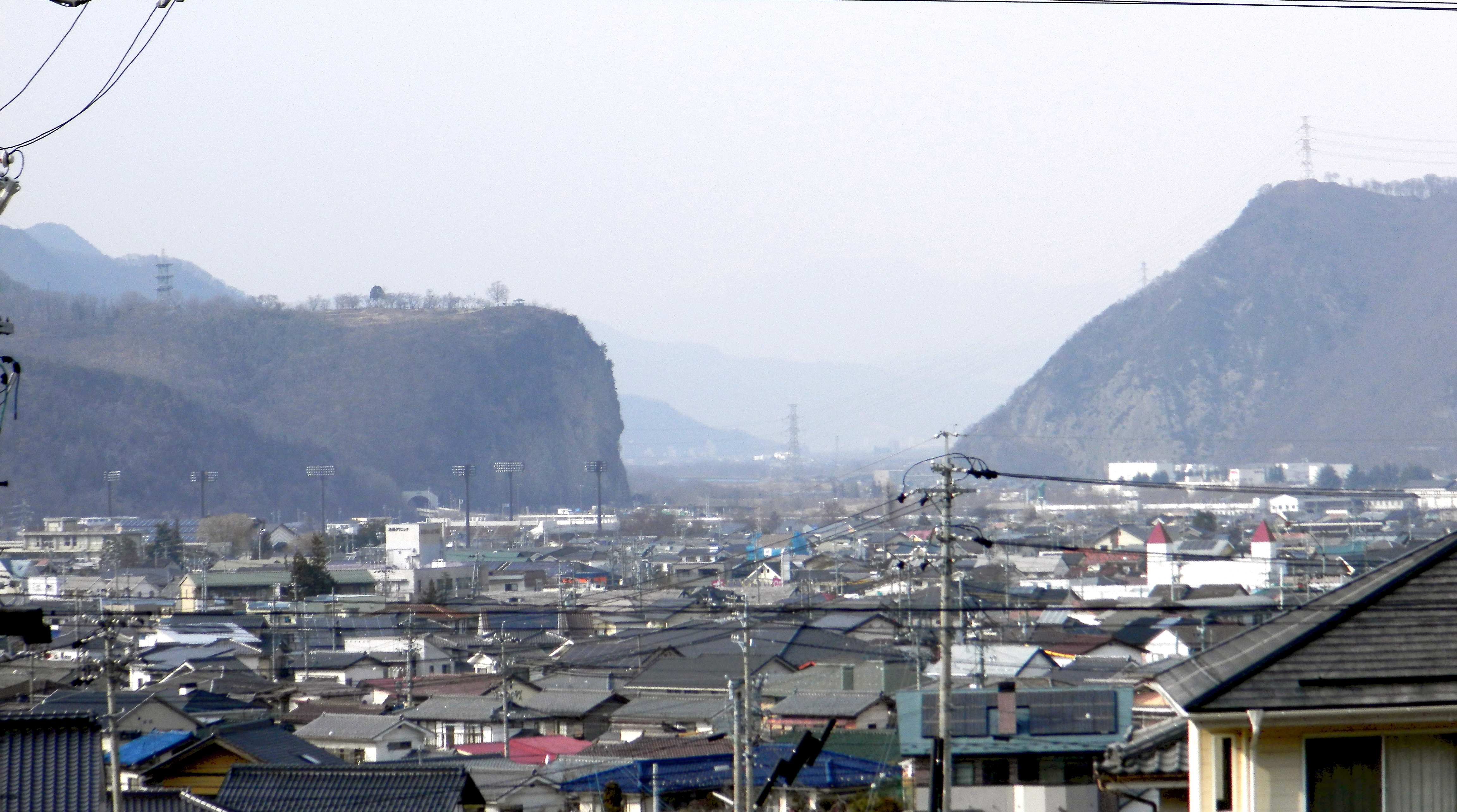 上田市倉升付近から見た岩鼻半過